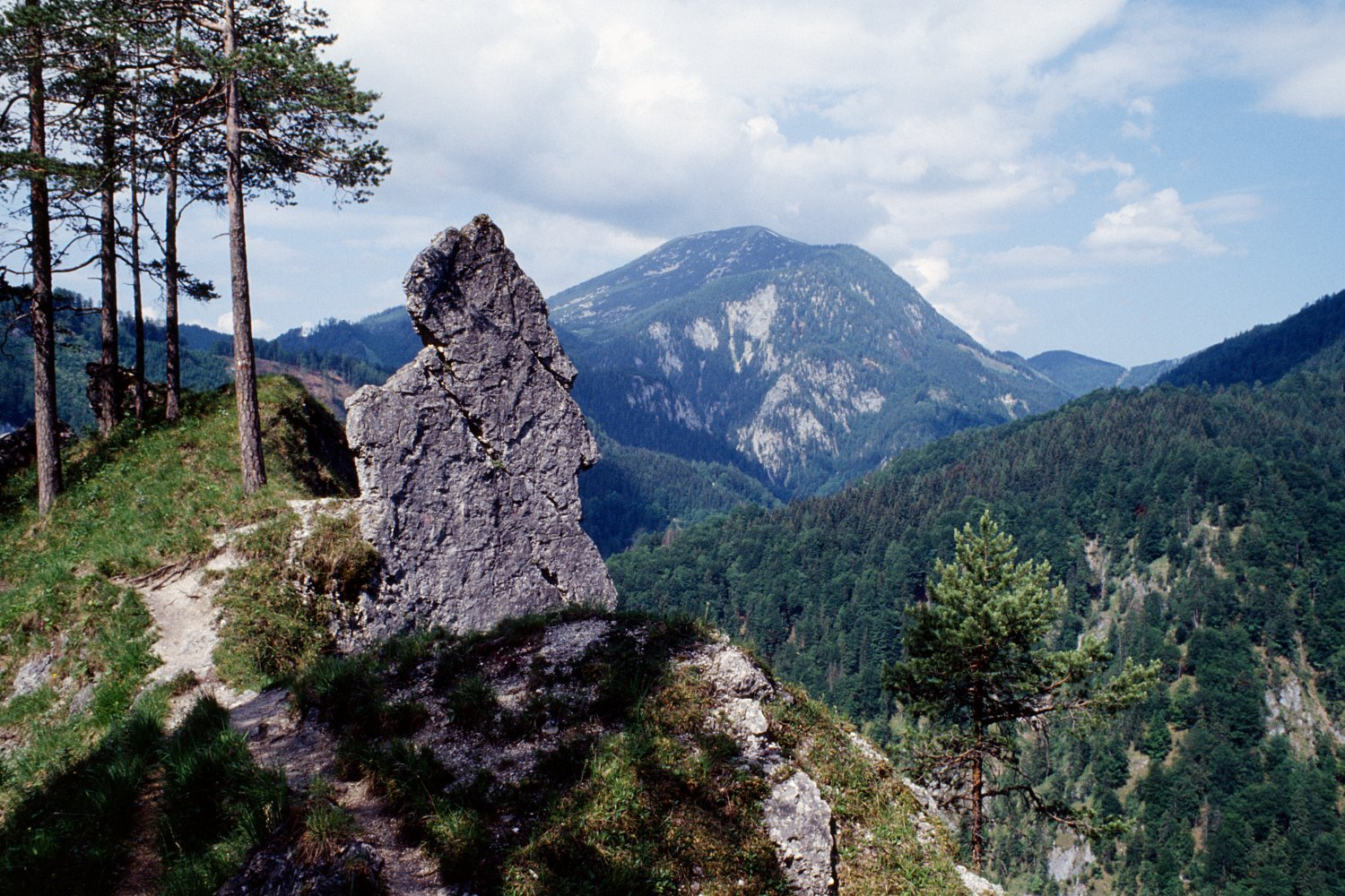 Der Große Größtenberg (1724m) im Reichraminger Hintergebirge, aufgenommen vom Hochschlacht-Steig (Nationalpark Kalkalpen)